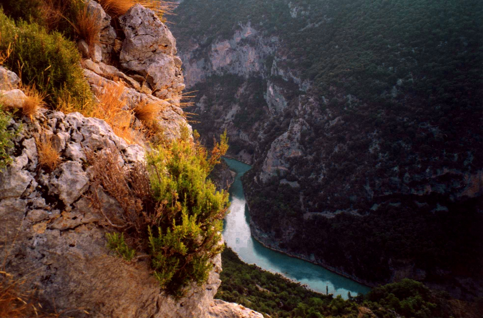 El estrecho del Entremón, bajo la cornisa extraplomada de Samitier donde se encuentran el castillo y ermita.